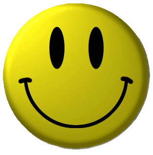 Que es un amigo?